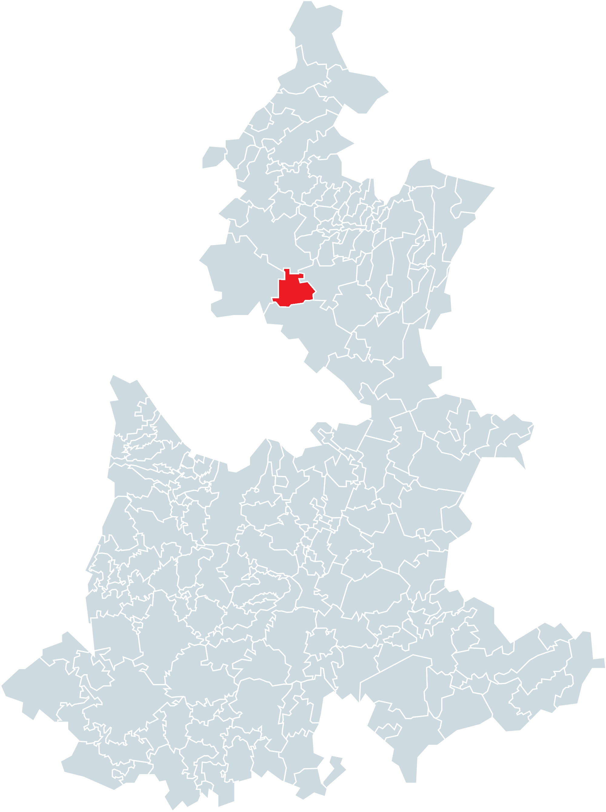 Municipio de Aquixtla